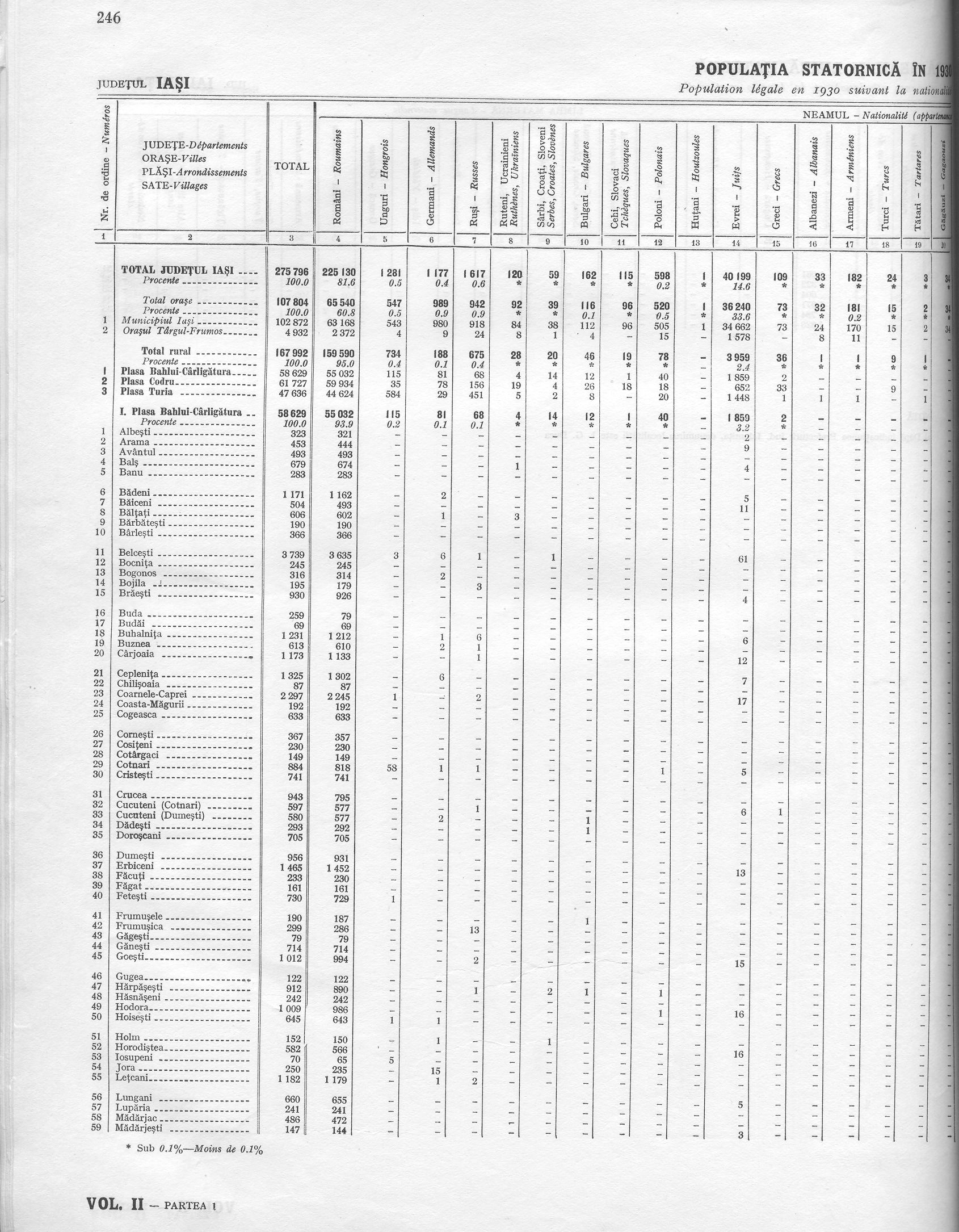 Recensamantul general al populatiei Romaniei din 29 decemvrie 1930, vol. II, tiparit la Monitorul Oficial, Imprimeria Nationala, Bucuresti 1938.